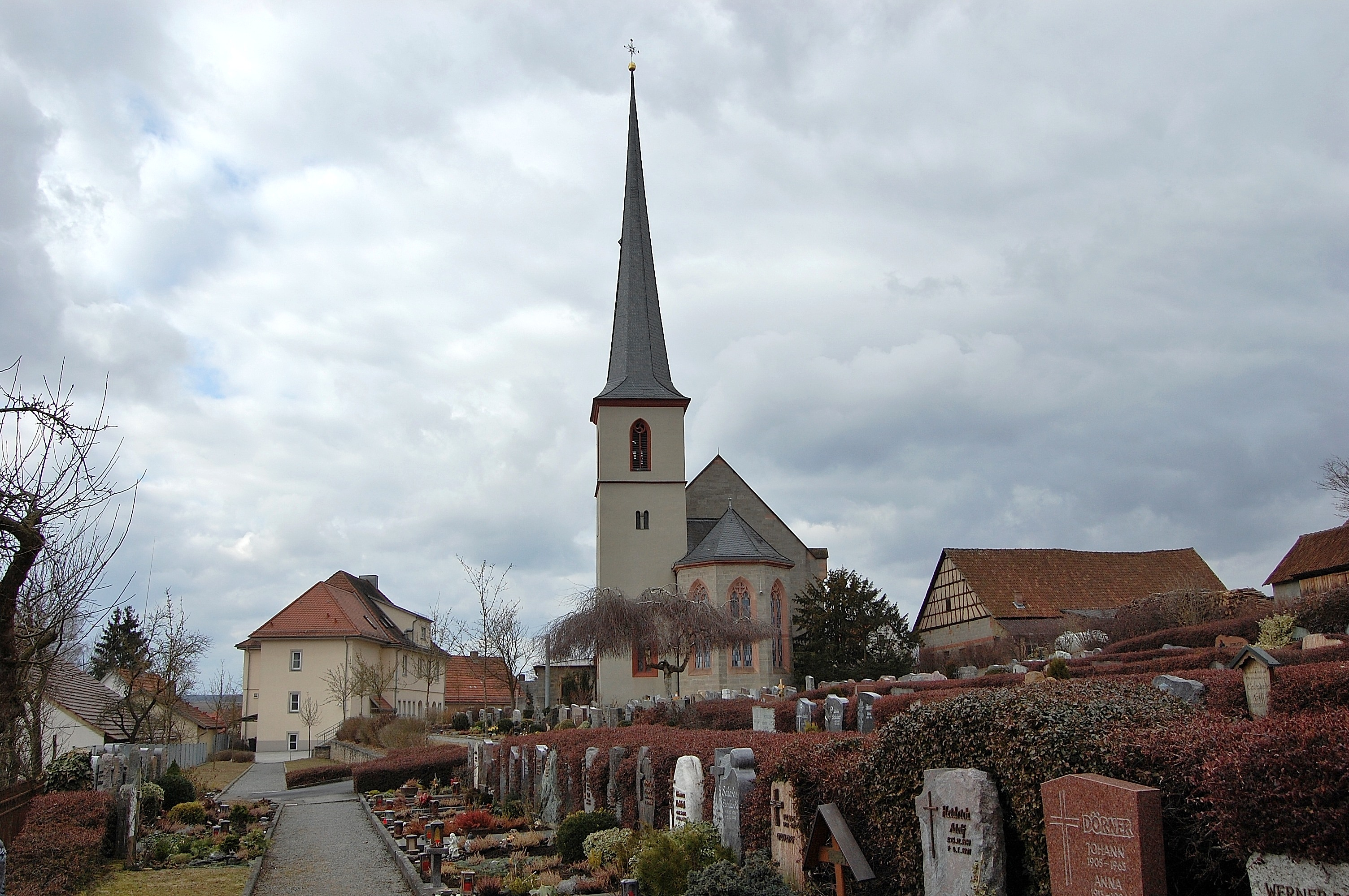 Wollbach, Unterfranken, Pfarrkirche St. Bonifatius in Wollbach